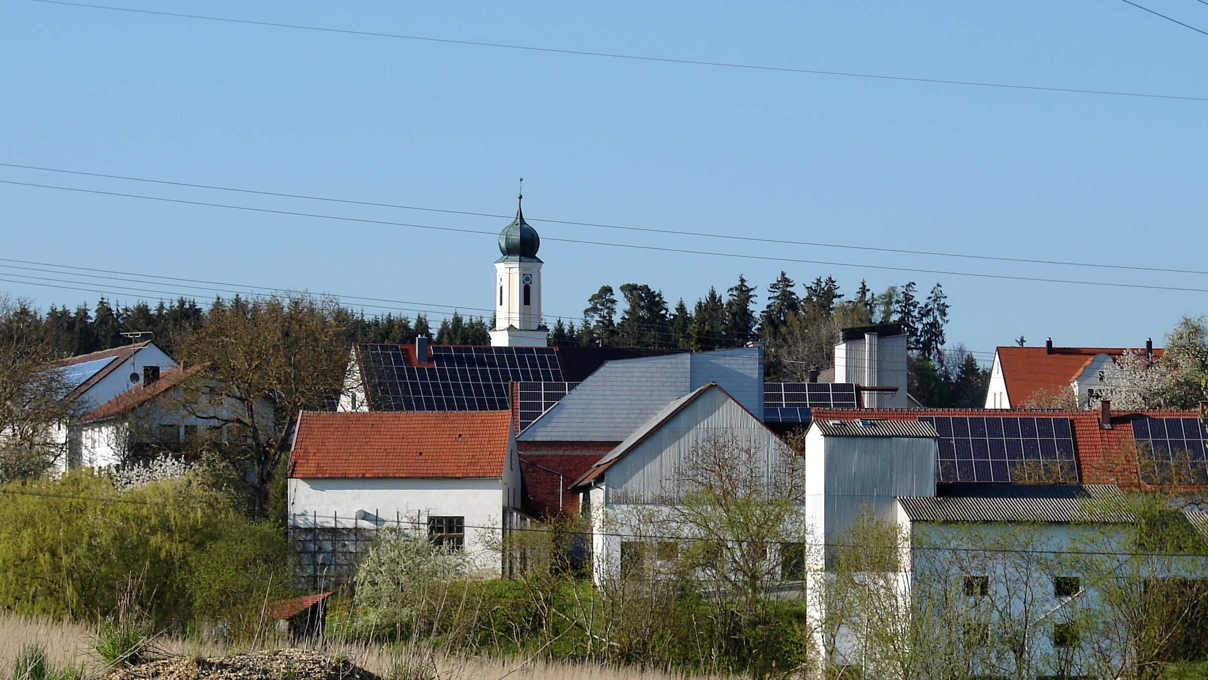 Rudertshausen ist ein Ortsteil des Marktes Au in der Hallertau.